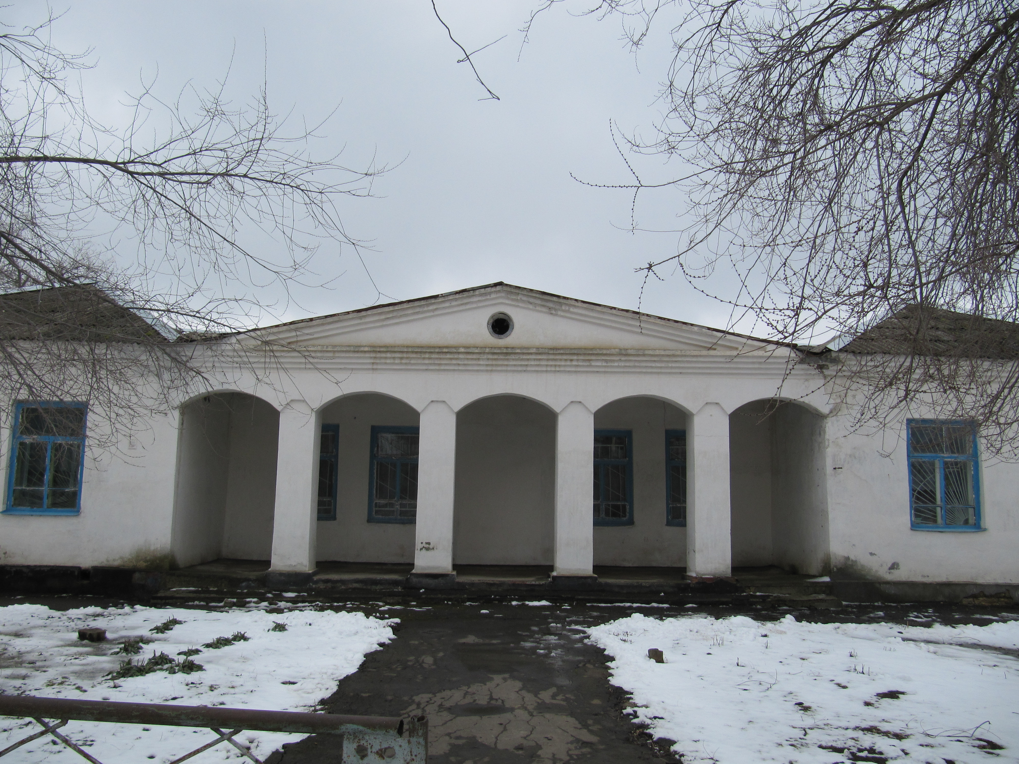 Городовиковская городская библиотека